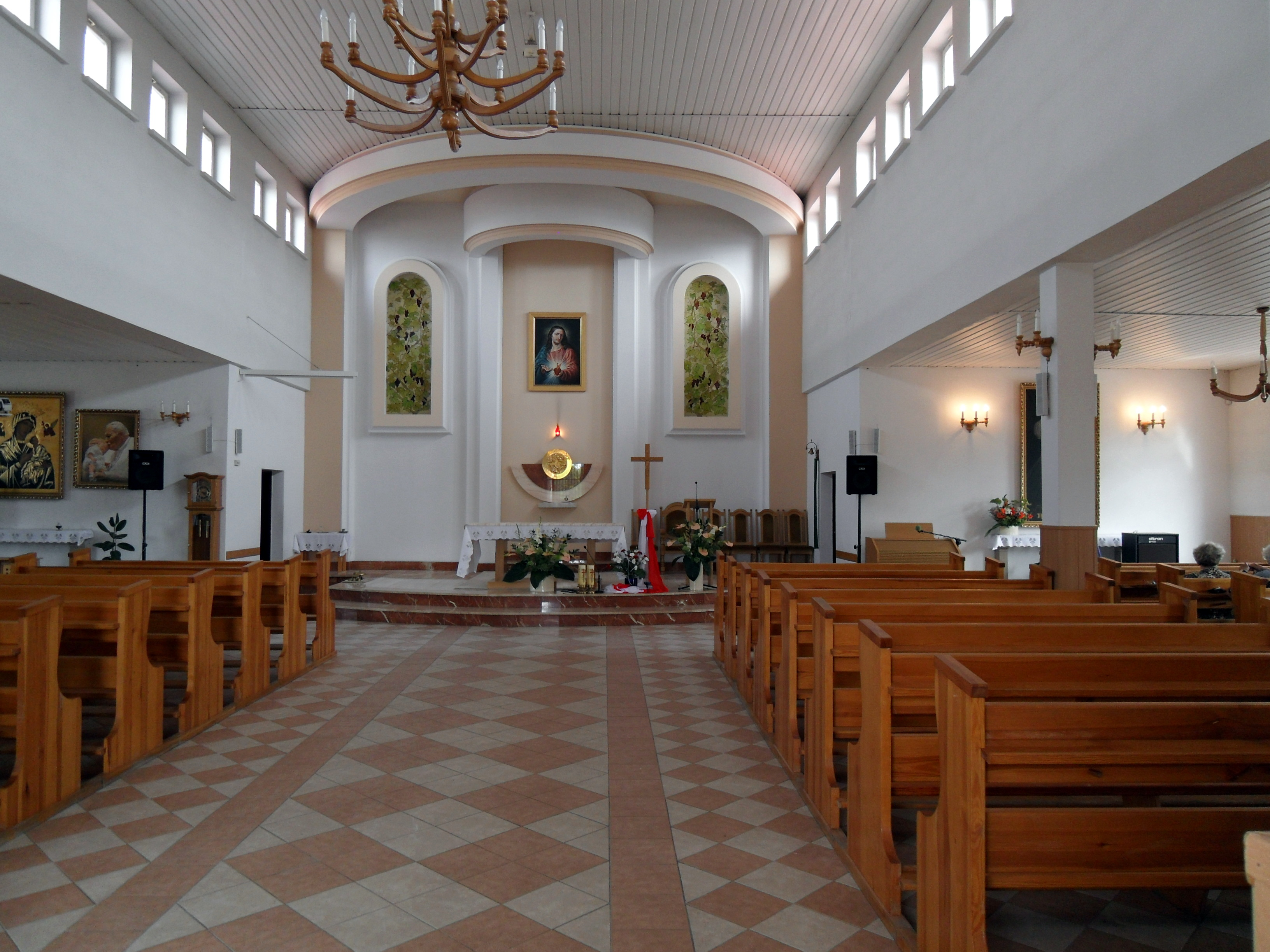 Kościół pw. Najświętszego Serca Pana Jezusa w Ursusie przy ul. Piastowskiej